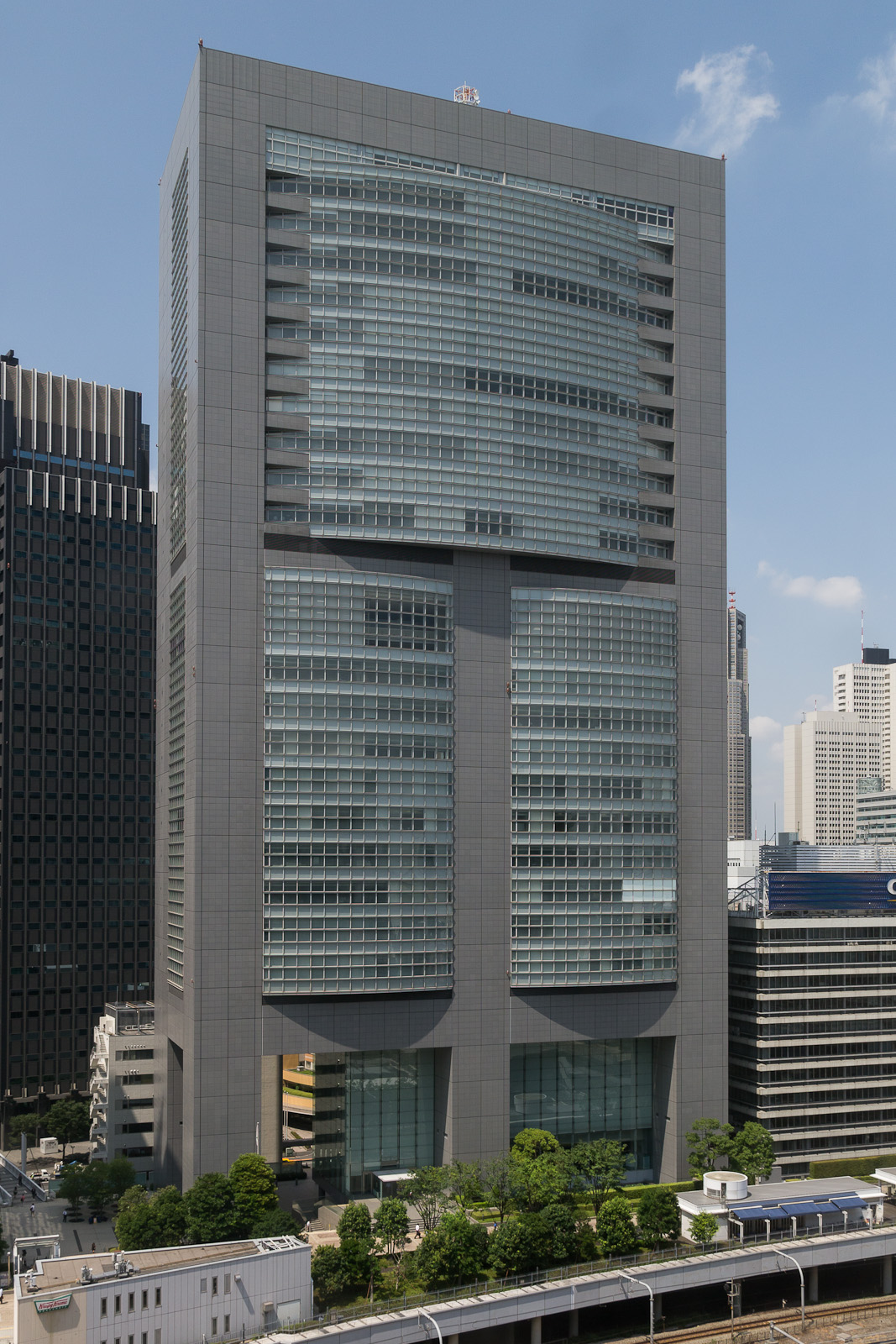 JR東日本本社ビル、東京都渋谷区代々木。